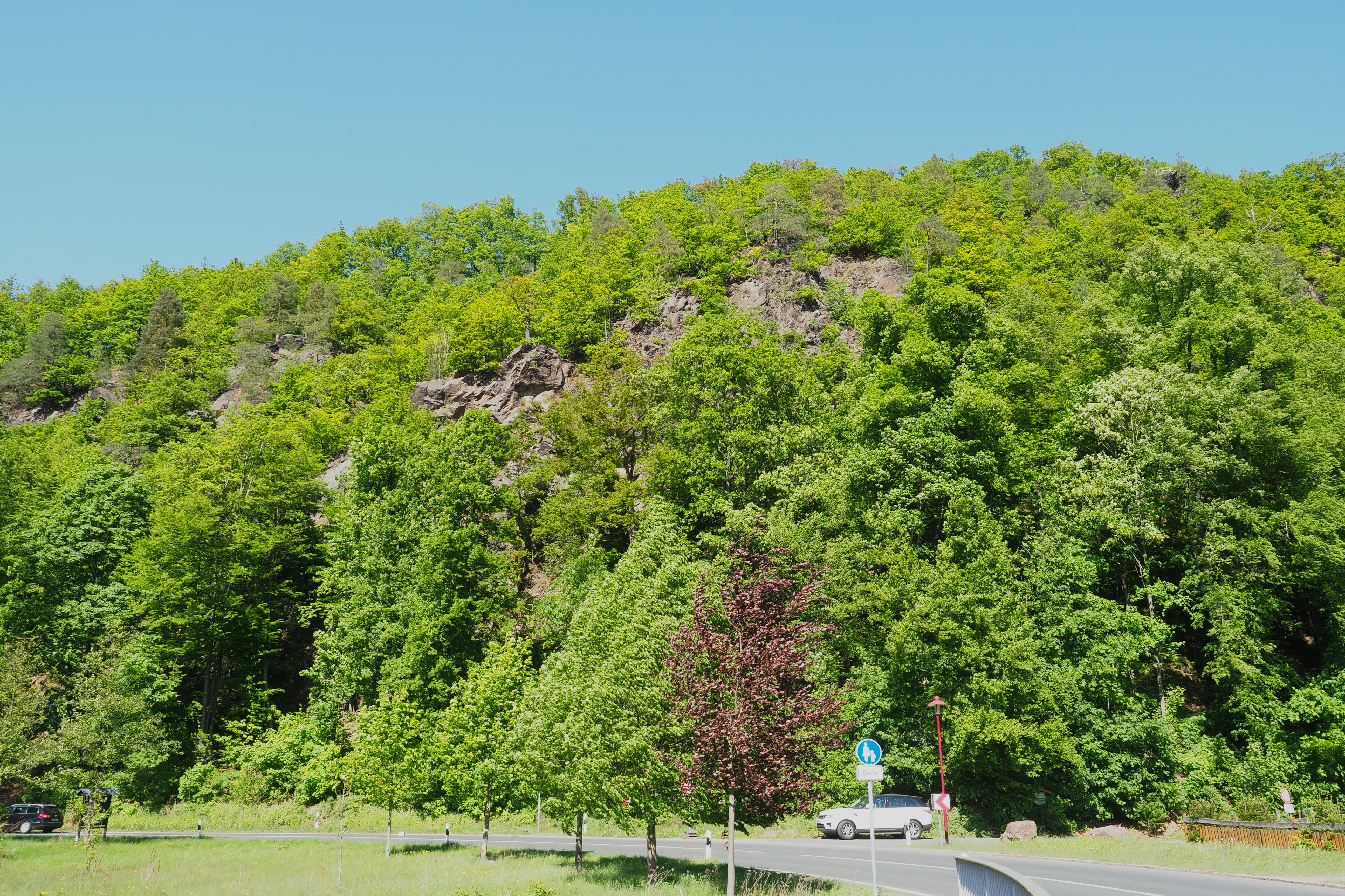 Naturschutzgebiet Müglitztalhänge Schlottwitz